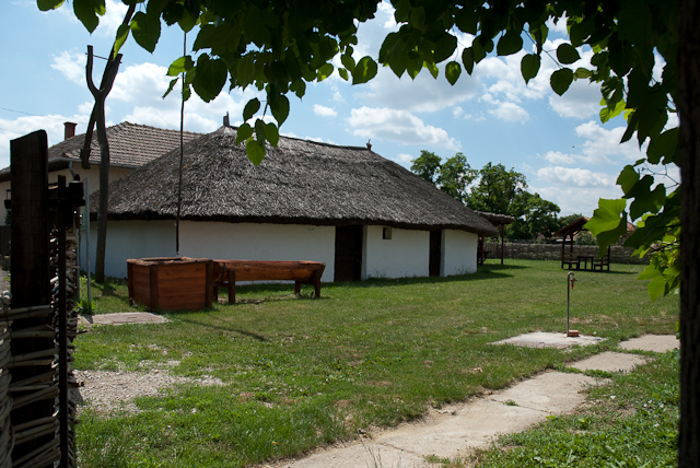 Tiszacsege Tüzelős-ól múzeum (Hajdú-Bihar megye)